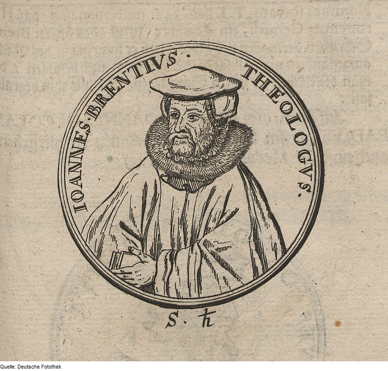 Original image description from the Deutsche Fotothek Münze & Gedenkmünze & Schaumünze & Medaille